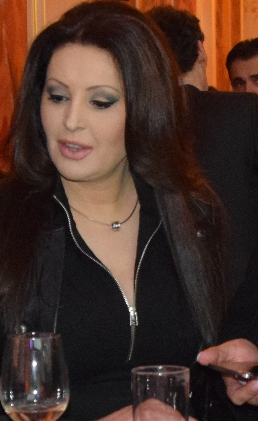 Српски (ћирилица): Dragana Mirković